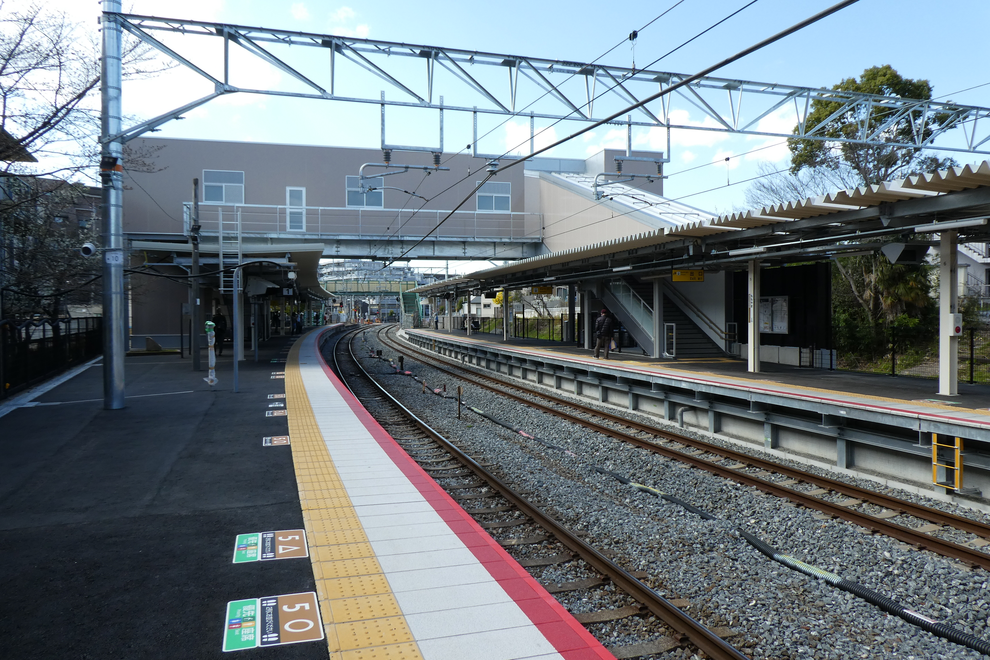 JR奈良線桃山駅。バリアフリー化完了。1番のりばホーム上から撮影。